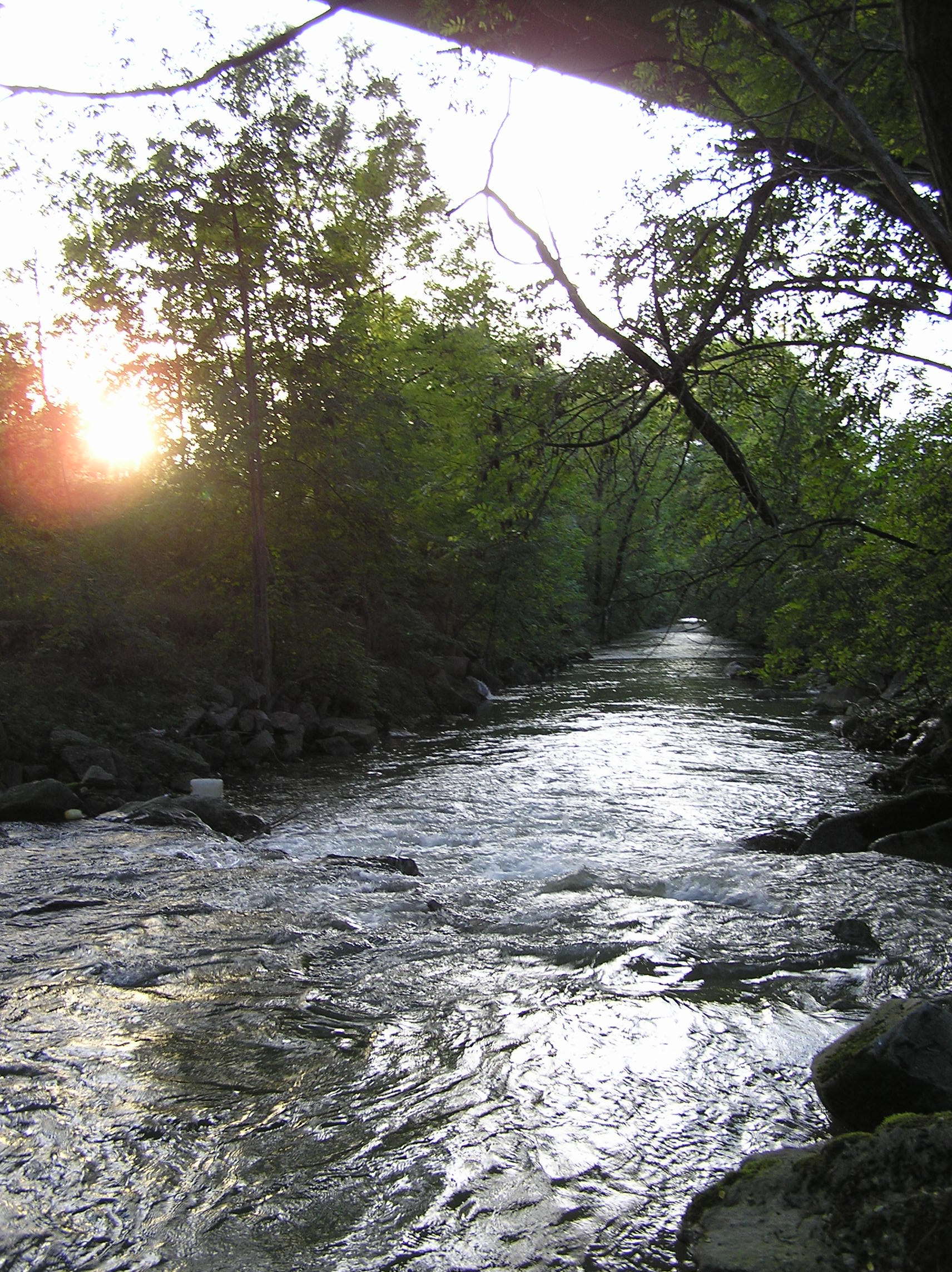 Die Ergolz bei Sissach, fotografiert von Sissacher